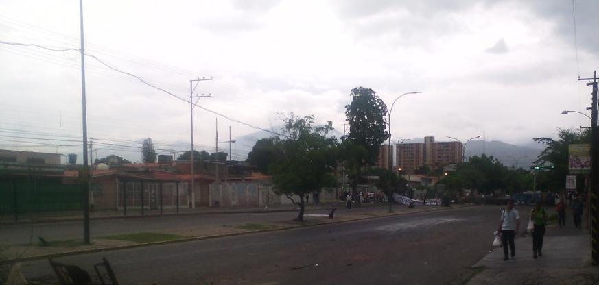 Fundacion mendoza maracay